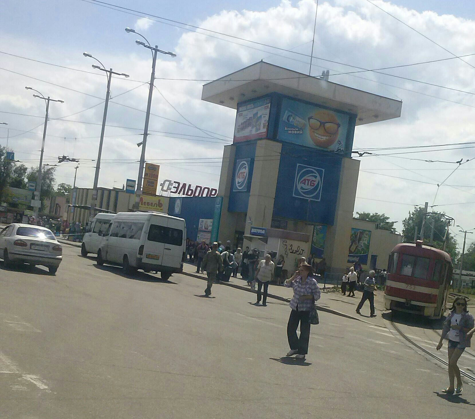 Запоріжжя. Привокзальна площа